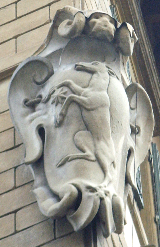 Palazzo pasquali, stemma pasquali